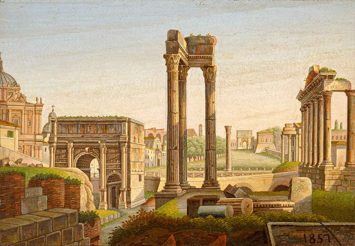 Forum Romanum. Mikromosaik, verschiedene Marmor- und Steinarten. Italien, datiert 1857. 20 x 28 cm